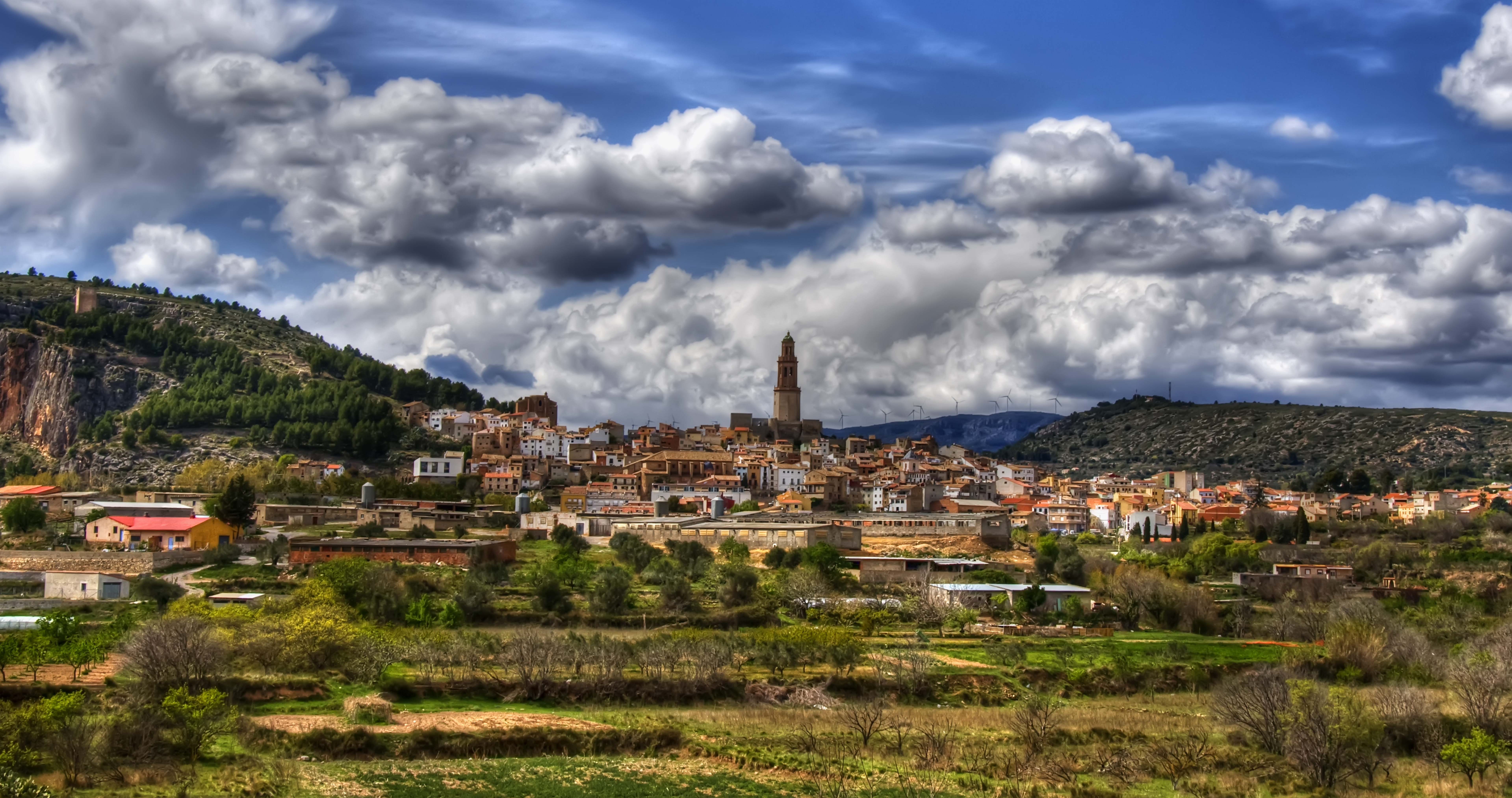 Curs mitjà del riu Palància This is a photography of a Special Area of Conservation in Spain with the ID: ES5232003. Natura2000 entry, EEA entry